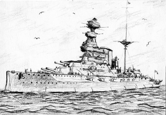 Британский линейный корабль "Уорспайт", рисунок.